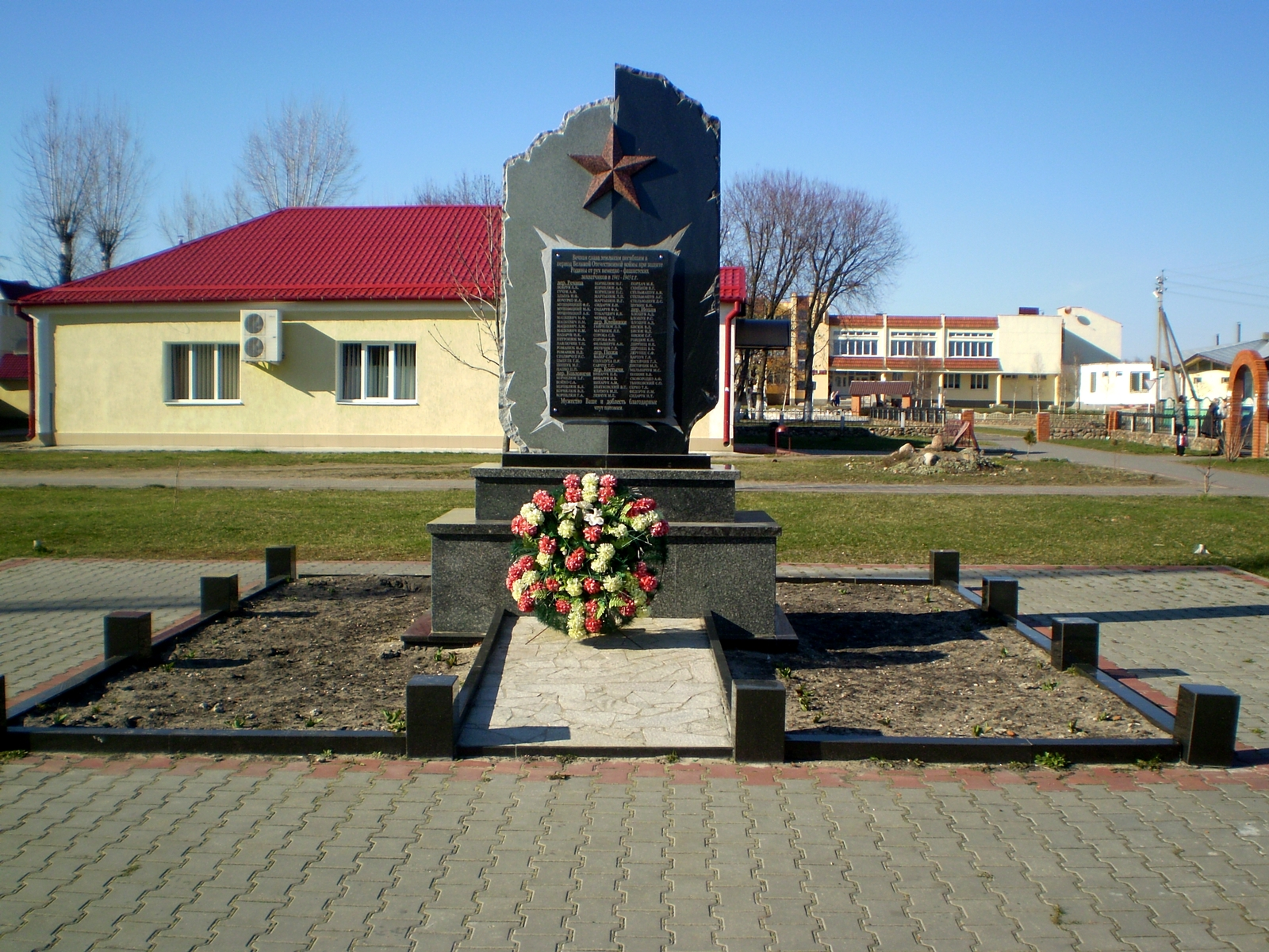 Мемарыяльны камень